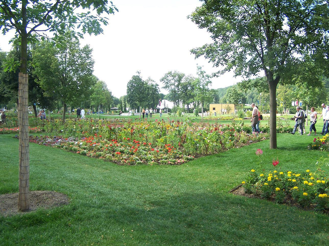 Bundesgartenschau 2007, Hofwiesenpark, Gera, Germany